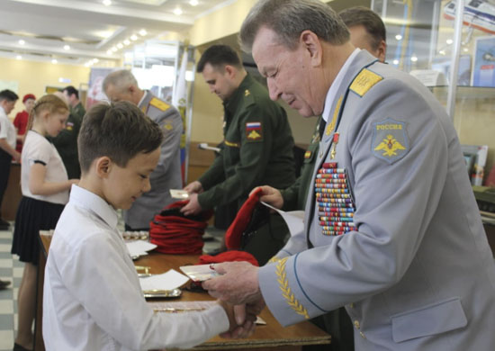 Герой Советского Союза, военный летчик-снайпер Николай Антошкин принимает детей в ряды Юнармии.